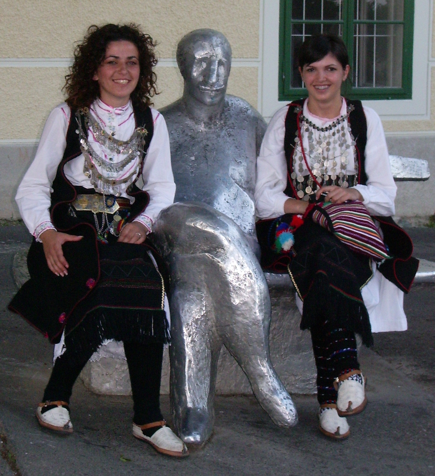 Narodna nošnja iz Tomislavgrada